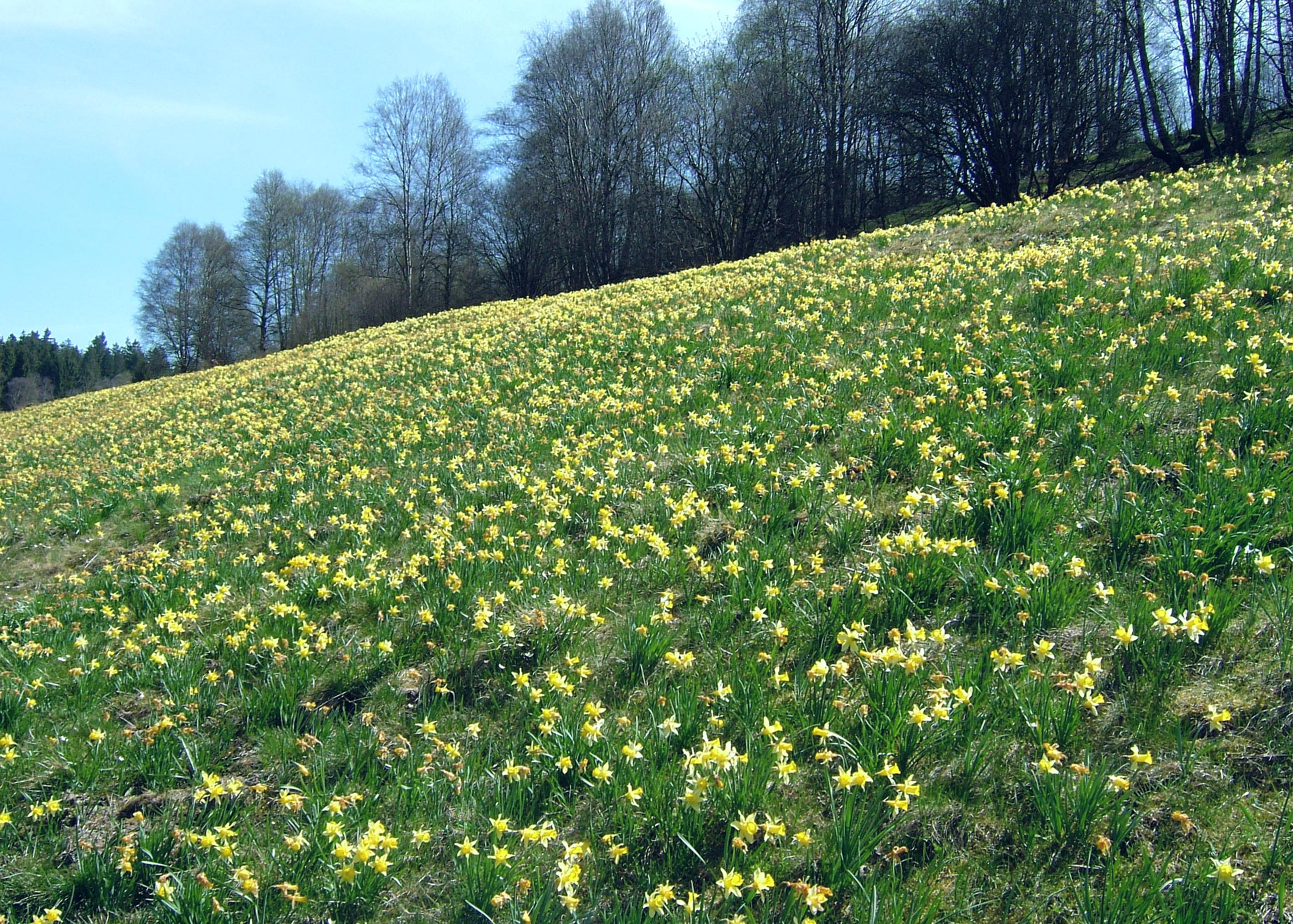 Narzissenwiese im Perlenbachtal, April 2019